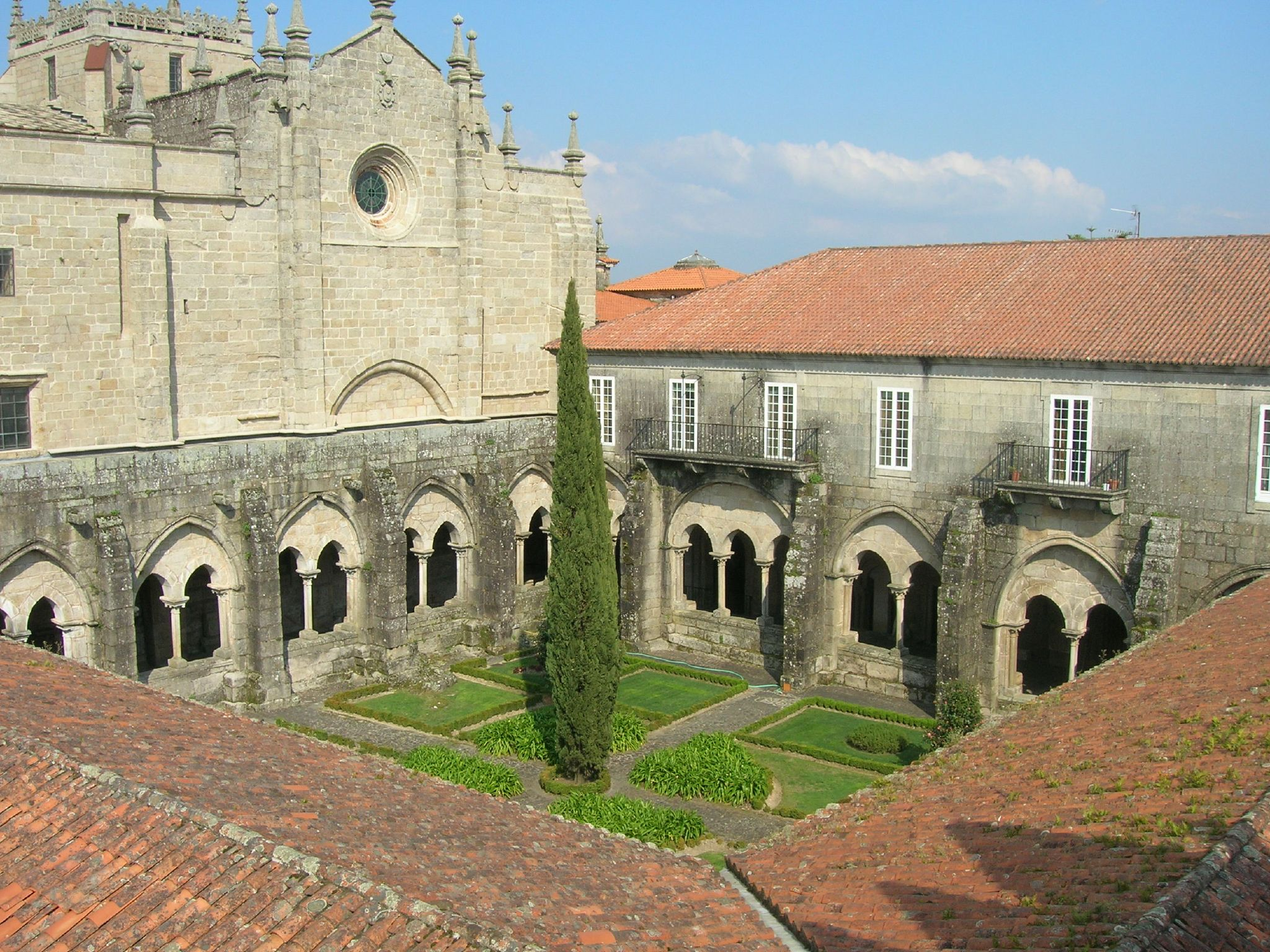 Vista del claustro y de la fachada sur de la catedral desde la Torre del Homenaje.